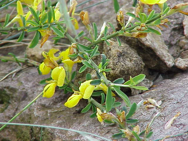 Species: Heide-Ginster ('Genista pilosa'), Hülsenfrüchtler (Fabaceae), Schmetterlingsblütler (Faboideae) Family: Fabaceae Image No. 1